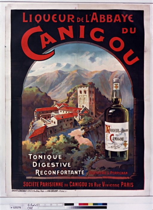 Affiche pour la liqueur de l'abbaye du Canigou (1911)